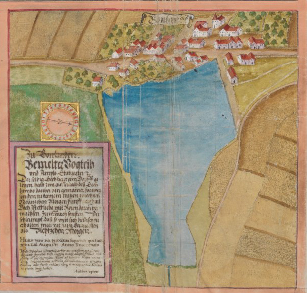 Seehbuch, darinnen alle Seeh und Weyher in dem löplichen Hertzogthumb Würtemberg. Stuttgart (?), Anfang 17. Jh.; Württembergische Landesbibliothek Stuttgart, Cod. hist. fol. 261, fol. 2r, Detail: Bonlanden